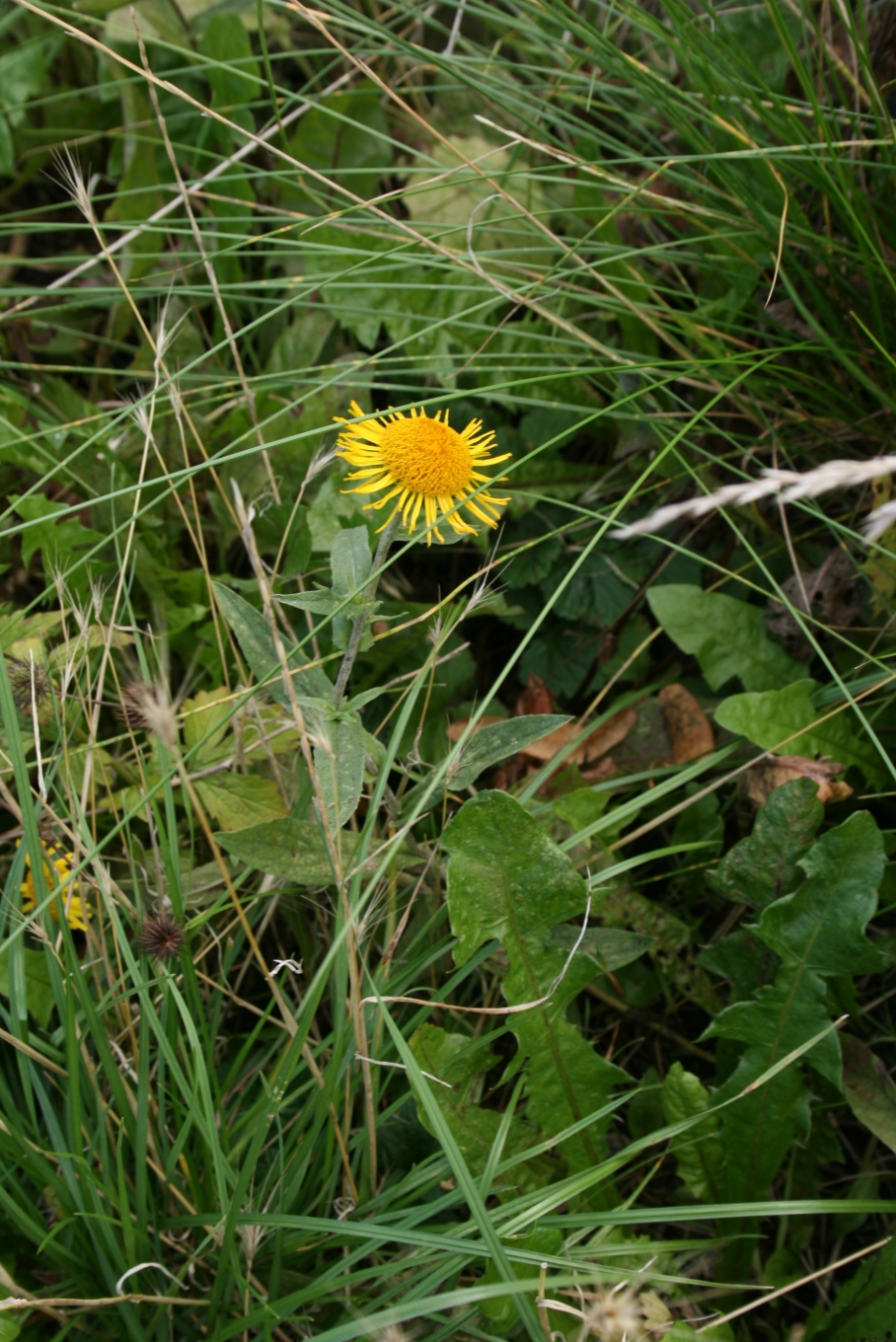 Inula salicina: Habit